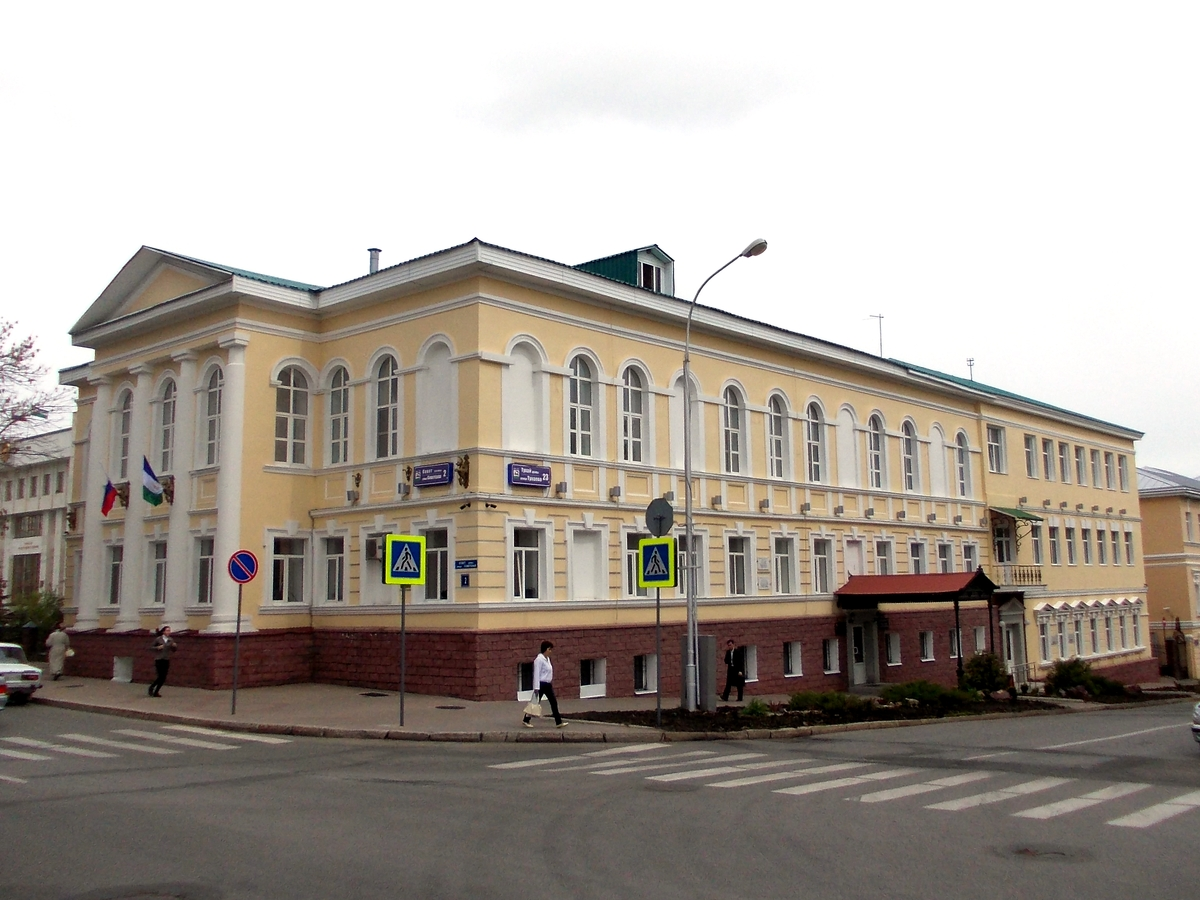 Дом губернатора в Уфе